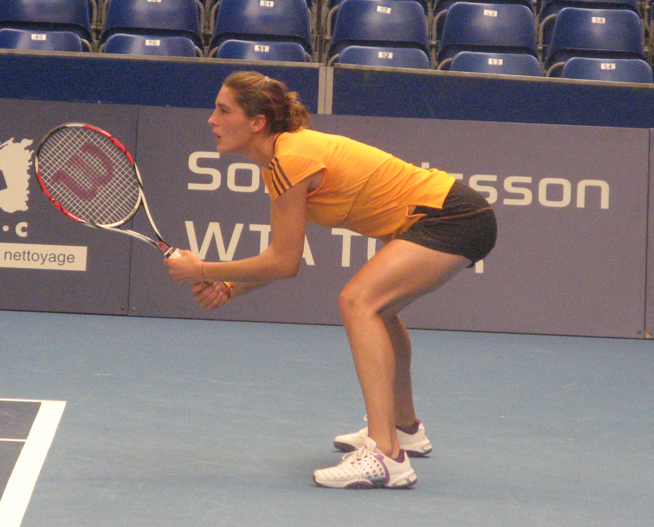 Andrea Petkovic beim WTA-Turnier in Luxemburg